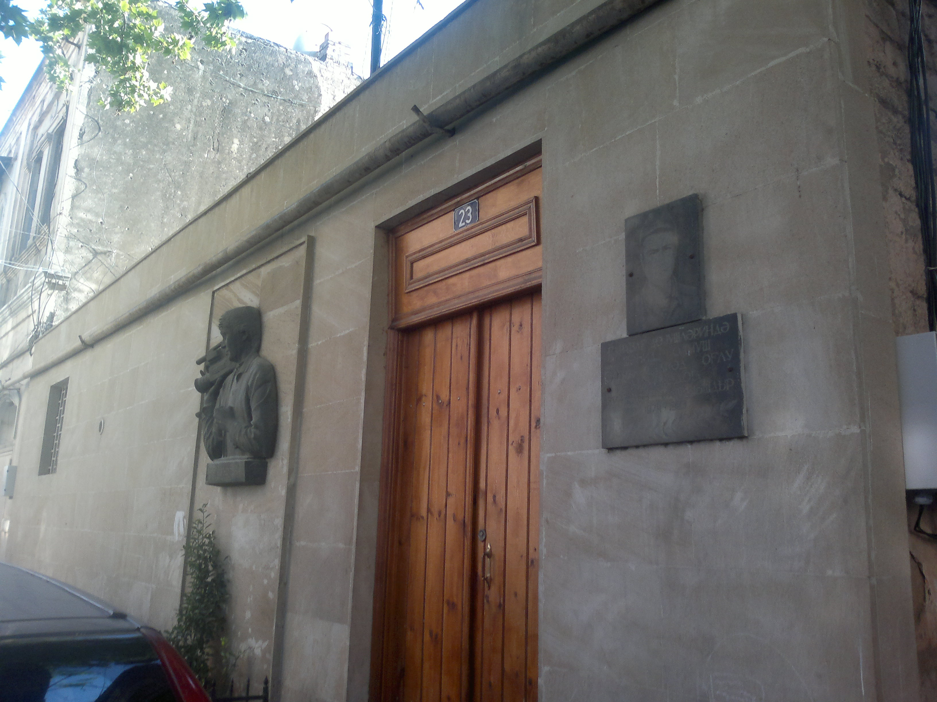 Building on 23 Murtuza Mukhtarov Street, where Chingiz Mustafayev lived.